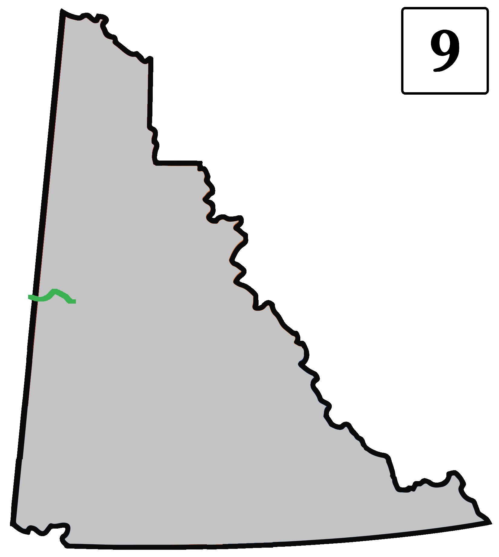 Carte de la route en Yukon